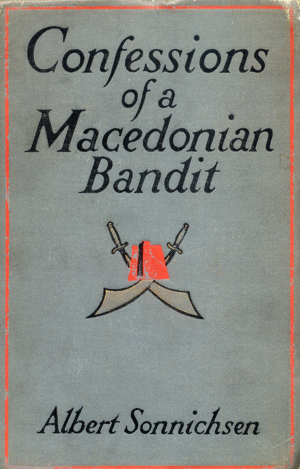 Корицата на книгата "Изповедта на един македонски четник"